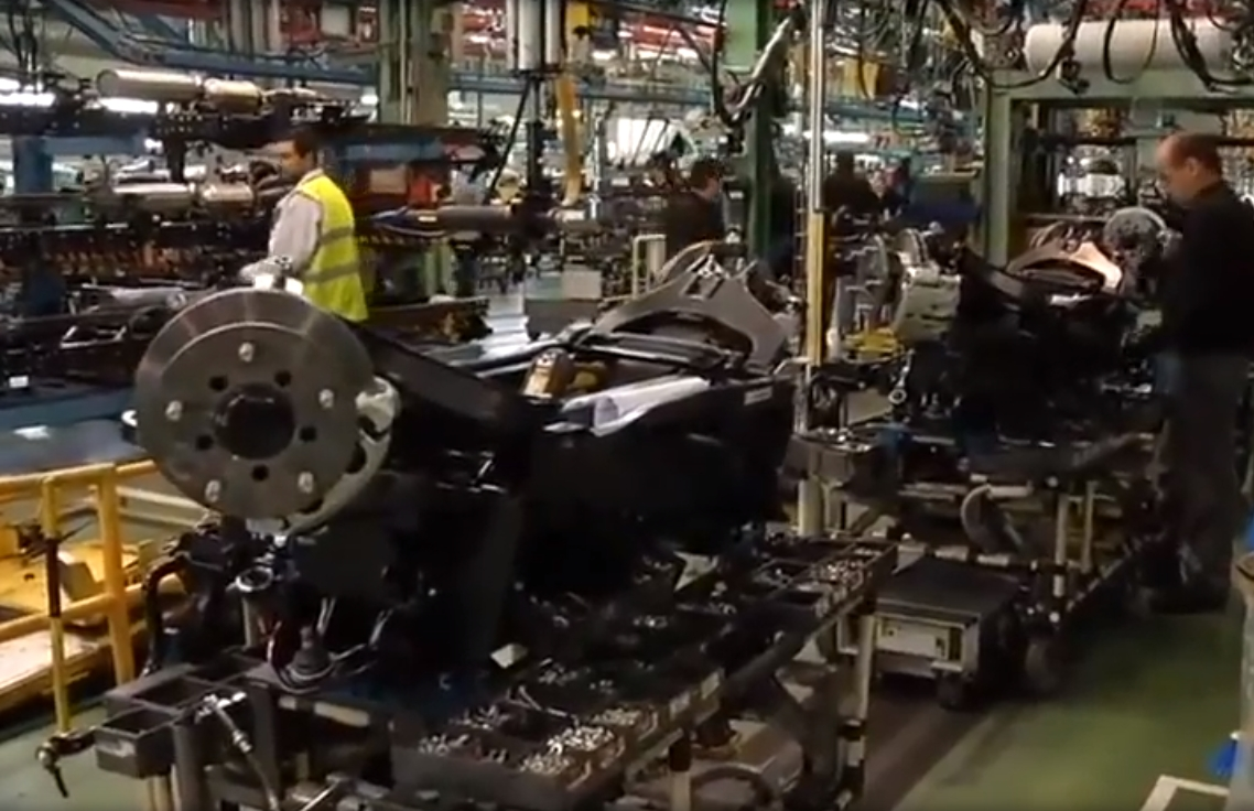 El presidente de la Junta de Castilla y León, Juan Vicente Herrera, ha visitado la planta de Nissan en Ávila, donde se ha presentado el Plan Industrial de la compañía para esta fábrica y se ha dado a conocer el nuevo modelo de camión ligero que se fabricará en sus instalaciones y que estará en el mercado a finales del año 2014.